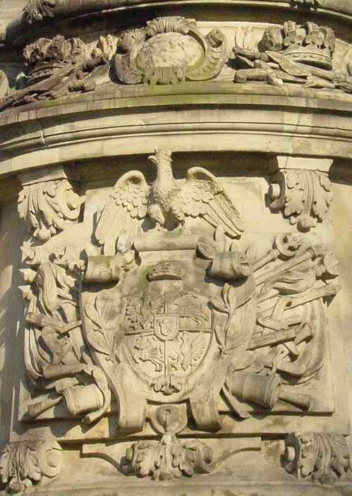 Pomnik Jana III Sobieskiego w Gdańsku; Herb króla: orzeł i Pogoń, w sercu tarczy herb Sobieskich Janina